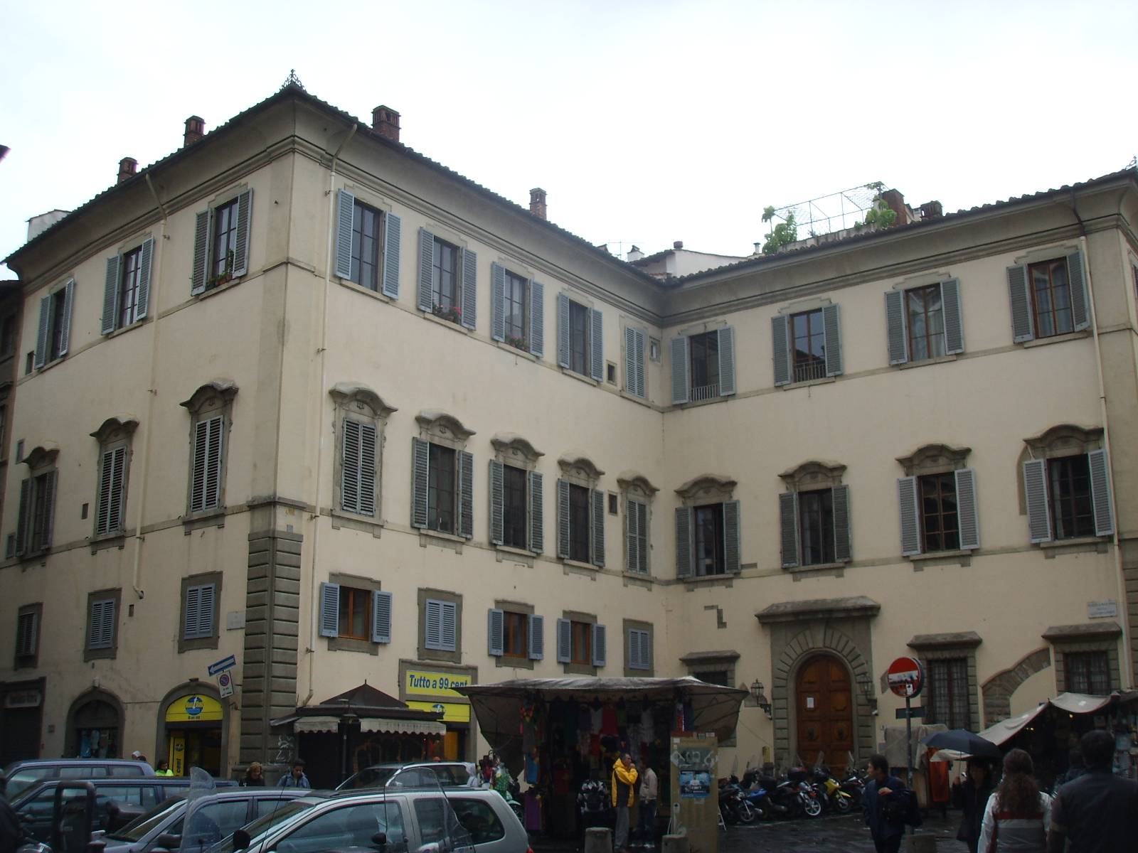 Palazzo aldobrandini 12